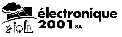 Logo Electronique 2001